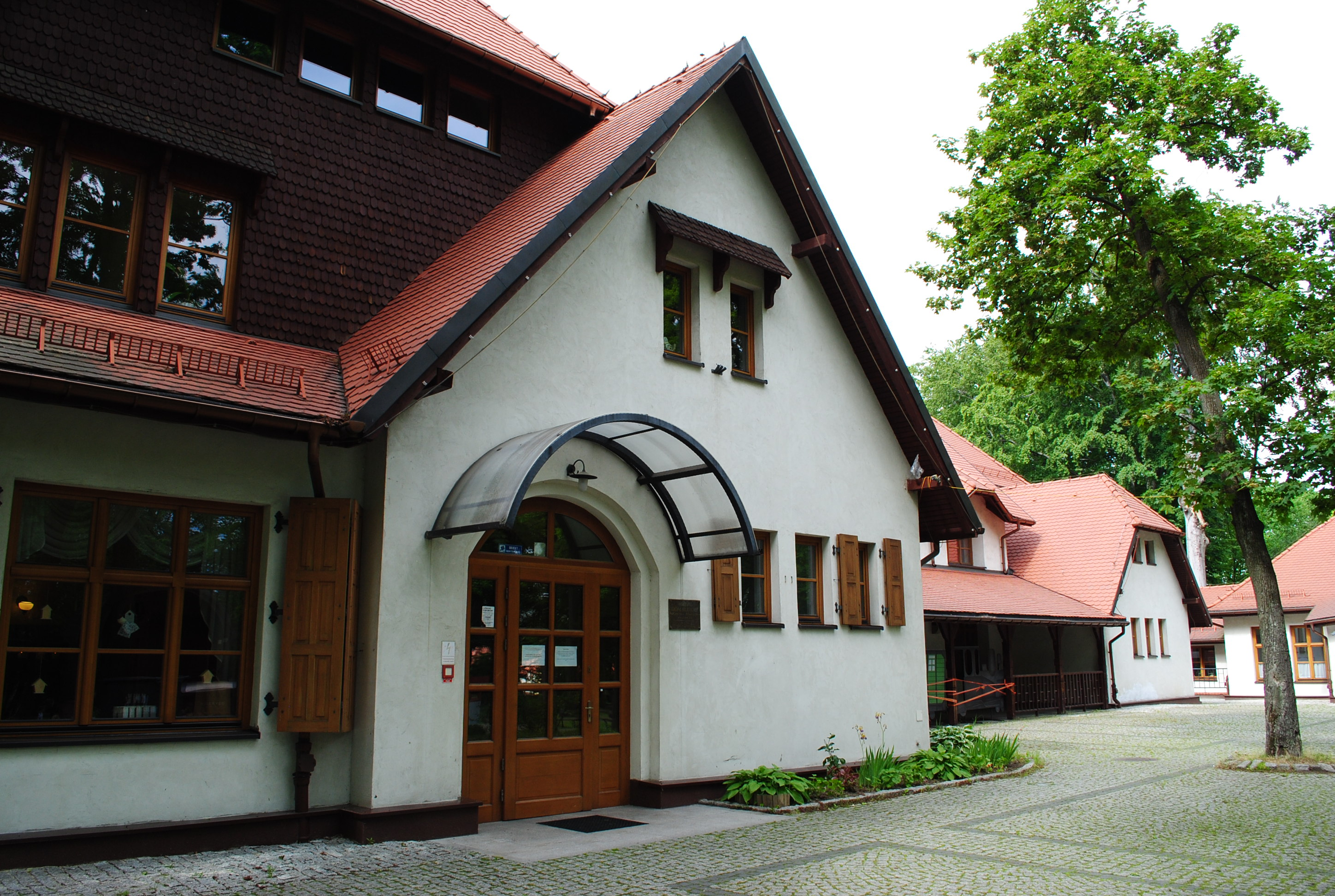 Katowice - Giszowiec. Plac Pod Lipami 1. Karczma Śląska